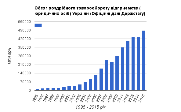 Обсяг роздрібного товарообороту підприємств (юридичних осіб). 1995-2015 рр. Дані за 1990–2014 роки наведено з урахуванням роздрібного товарообороту ресторанного господарства. Дані за 2014–2015 роки наведено без урахування тимчасово окупованої території Автономної Республіки Крим та частини зони проведення антитерористичної операції.